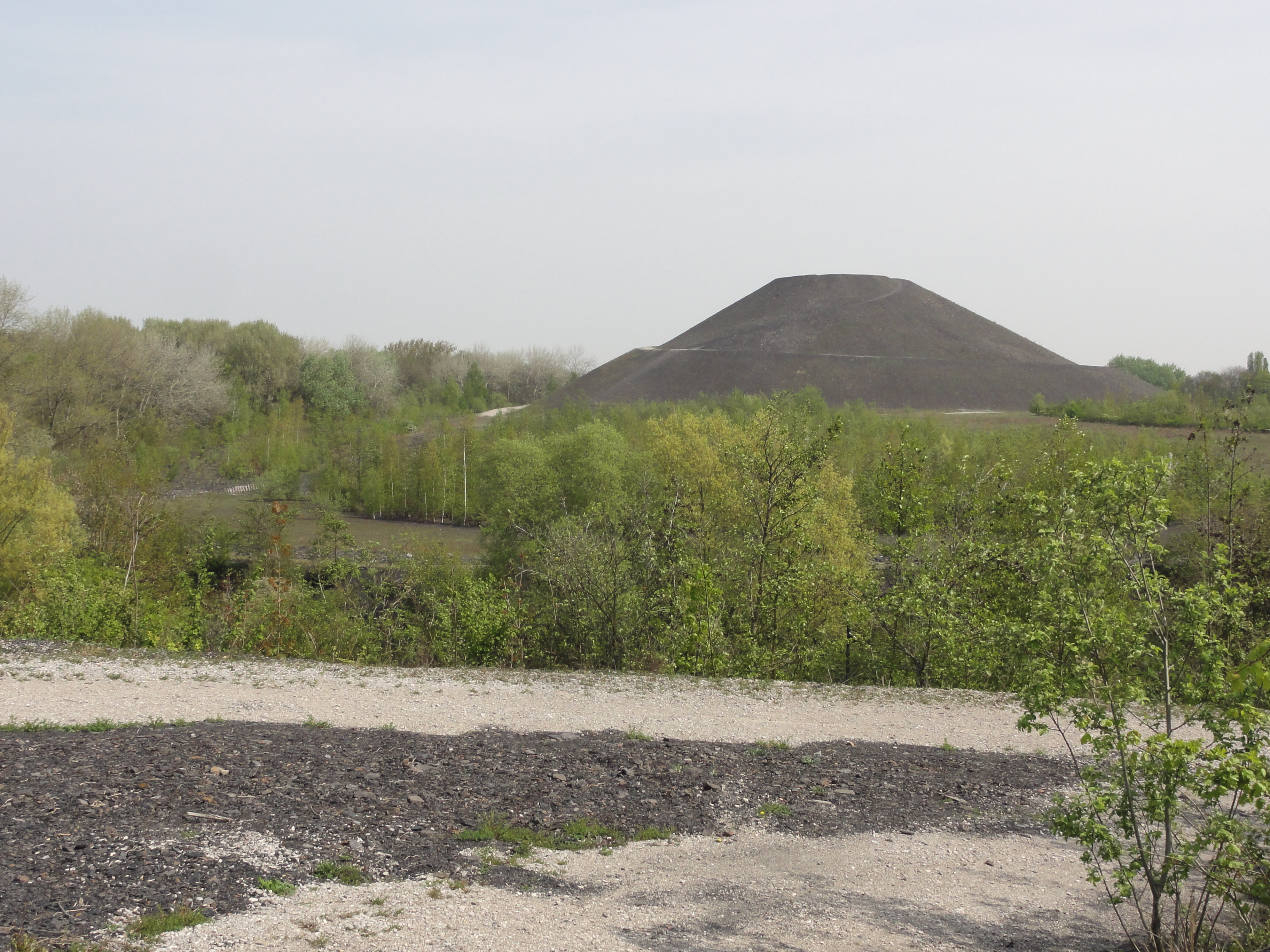 Terril n° 110 dit 9 de Dourges, fosse n° 9 - 9 bis de la Compagnie des mines de Dourges dans le bassin minier du Nord-Pas-de-Calais, Oignies, Pas-de-Calais, Nord-Pas-de-Calais, France. Le terril no 110 est inscrit sur la liste du patrimoine mondial de l'Unesco le 30 juin 2012 et y constitue en partie le site no 42.